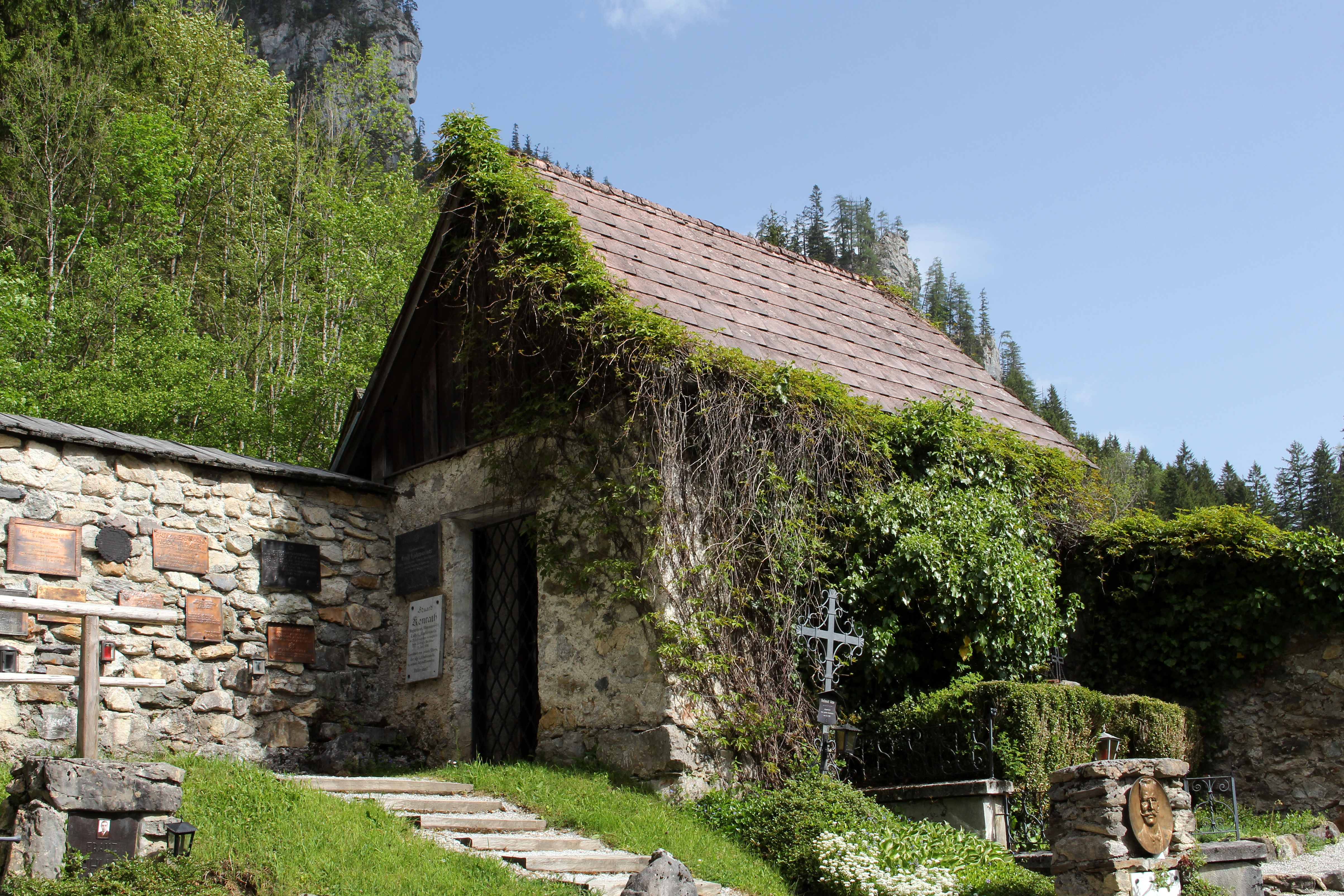 Auf dem Bergsteigerfriedhof in Johnsbach können Bergtote der Ennstaler Alpen im Einsatzgebiet des alpinen Rettungsdienstes Gesäuse (Gesäuseberge und Hallermauern) begraben werden.